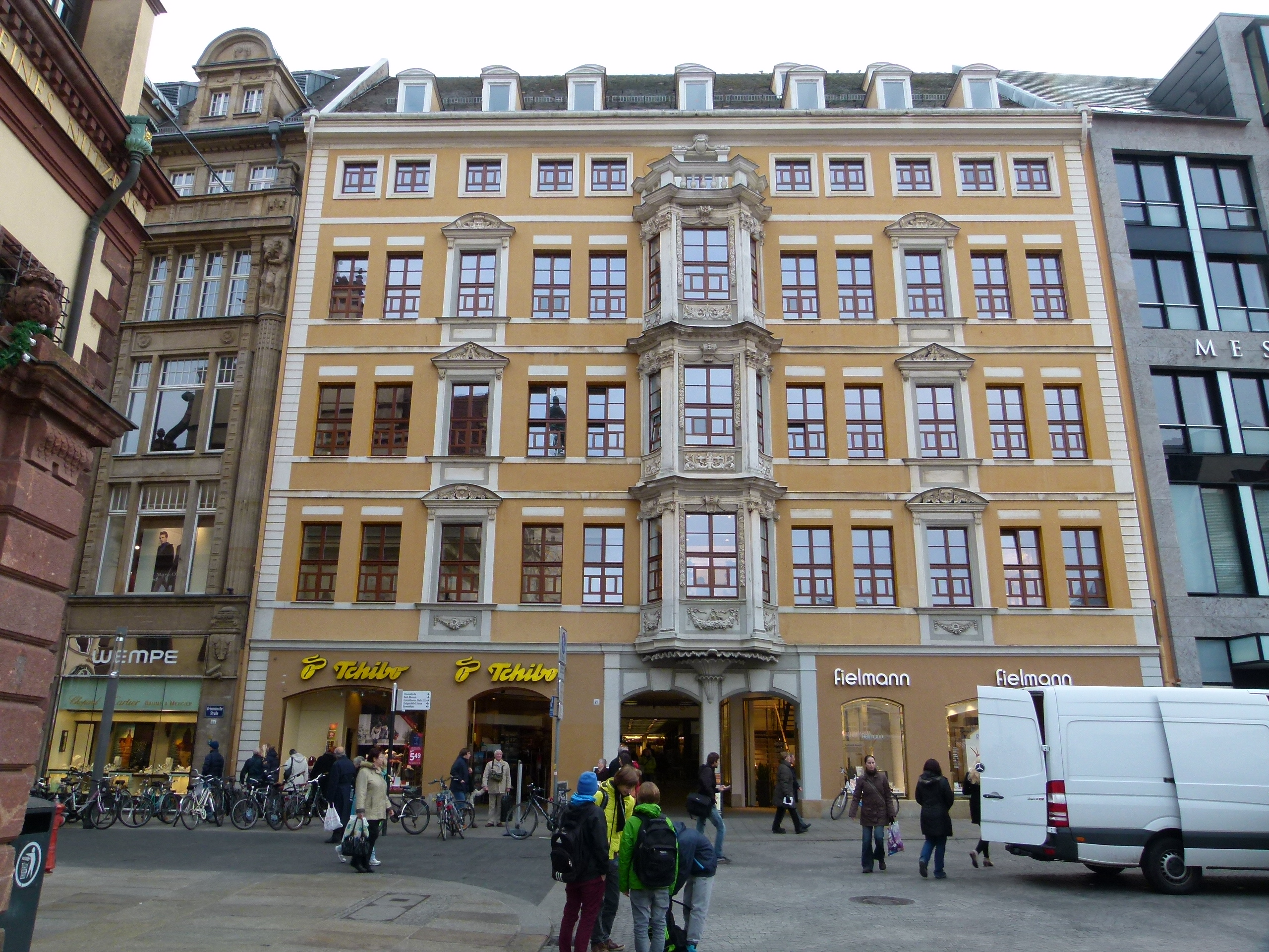 Denkmalgeschütztes Geschäftshaus, Markt 17, Leipzig